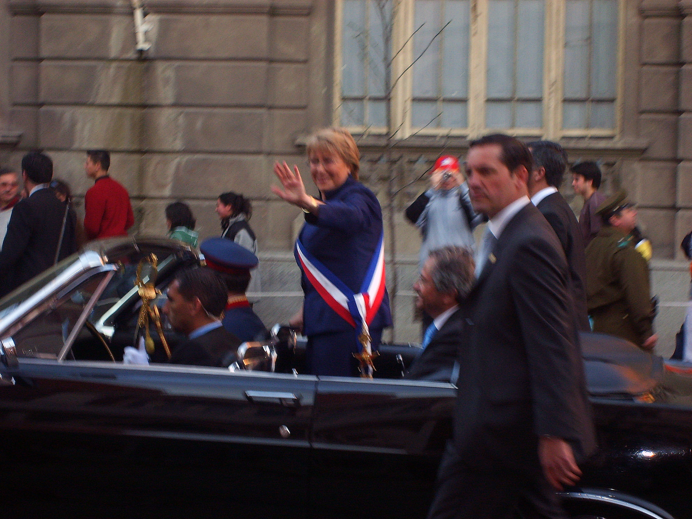 Fotografía de la Presidenta Bachelet luego de la Gran Parada Miltiar 2007